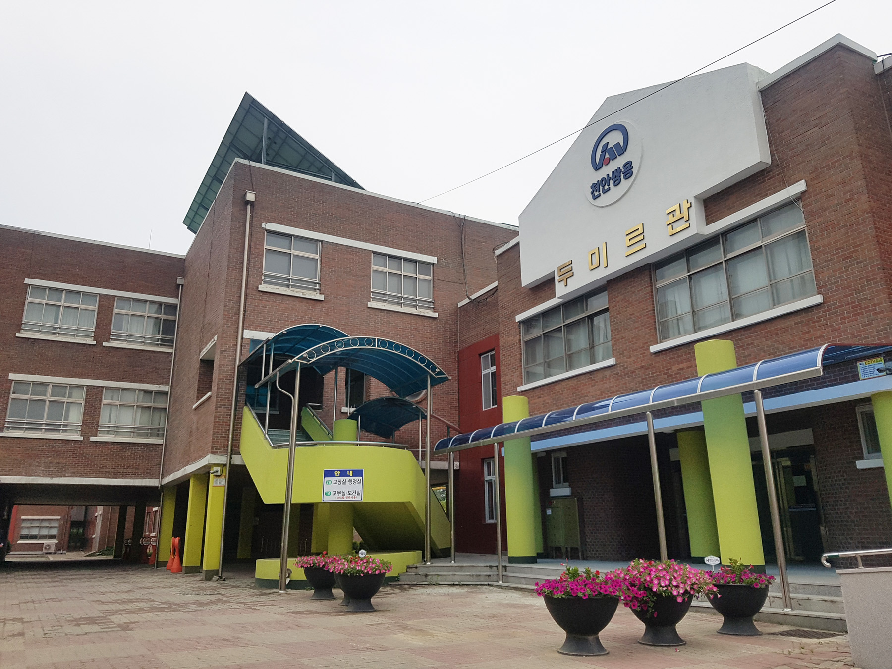 천안 쌍용초등학교